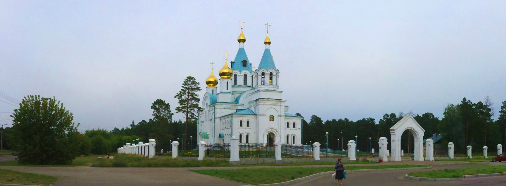 Свято-Троицкий кафедральный собор, расположенный в Ангарске, фото от 15.08.2012